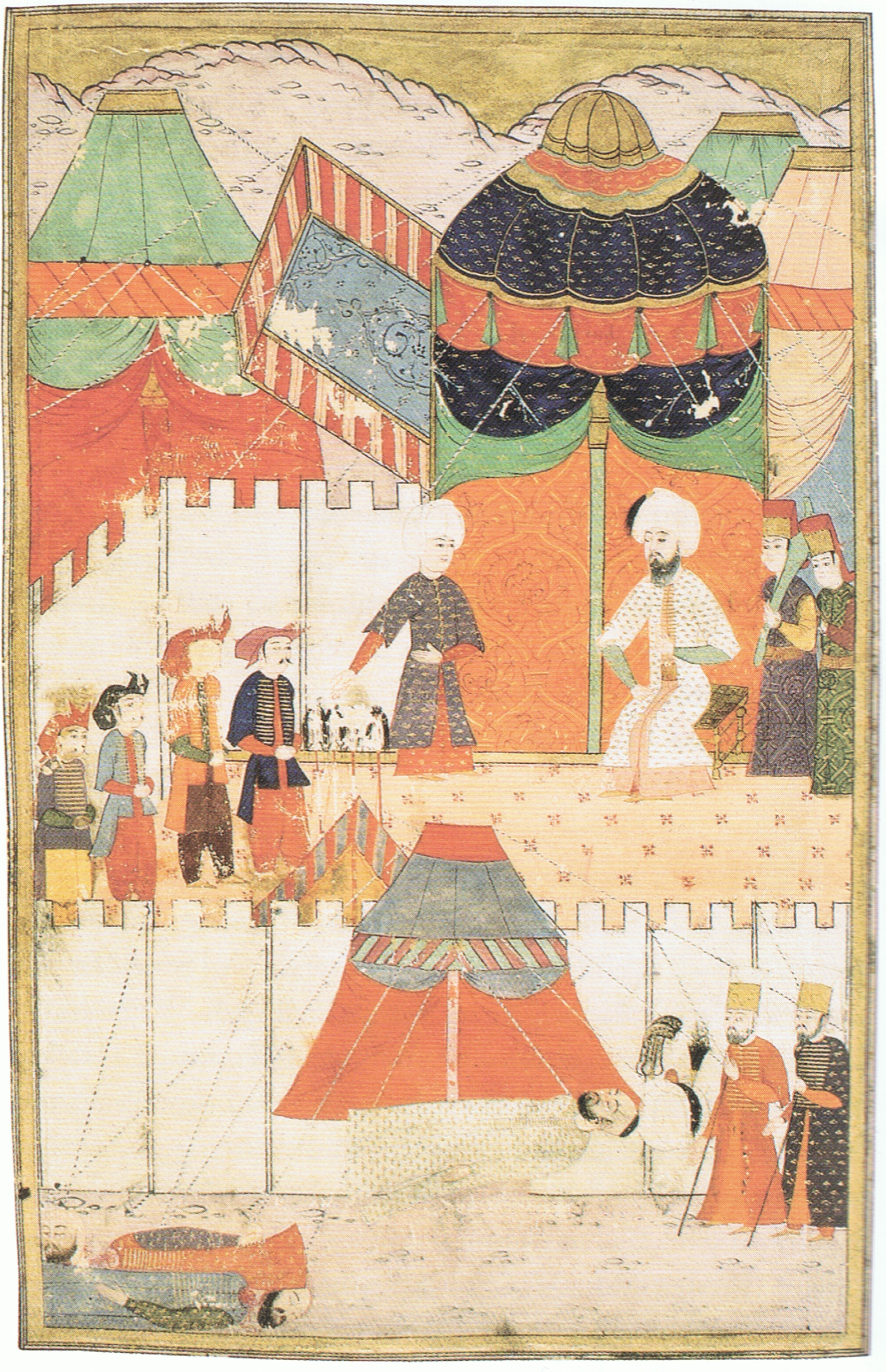 Die Aufbahrung des osmanischen Prinzen Mustafa nach seiner Hinrichtung.